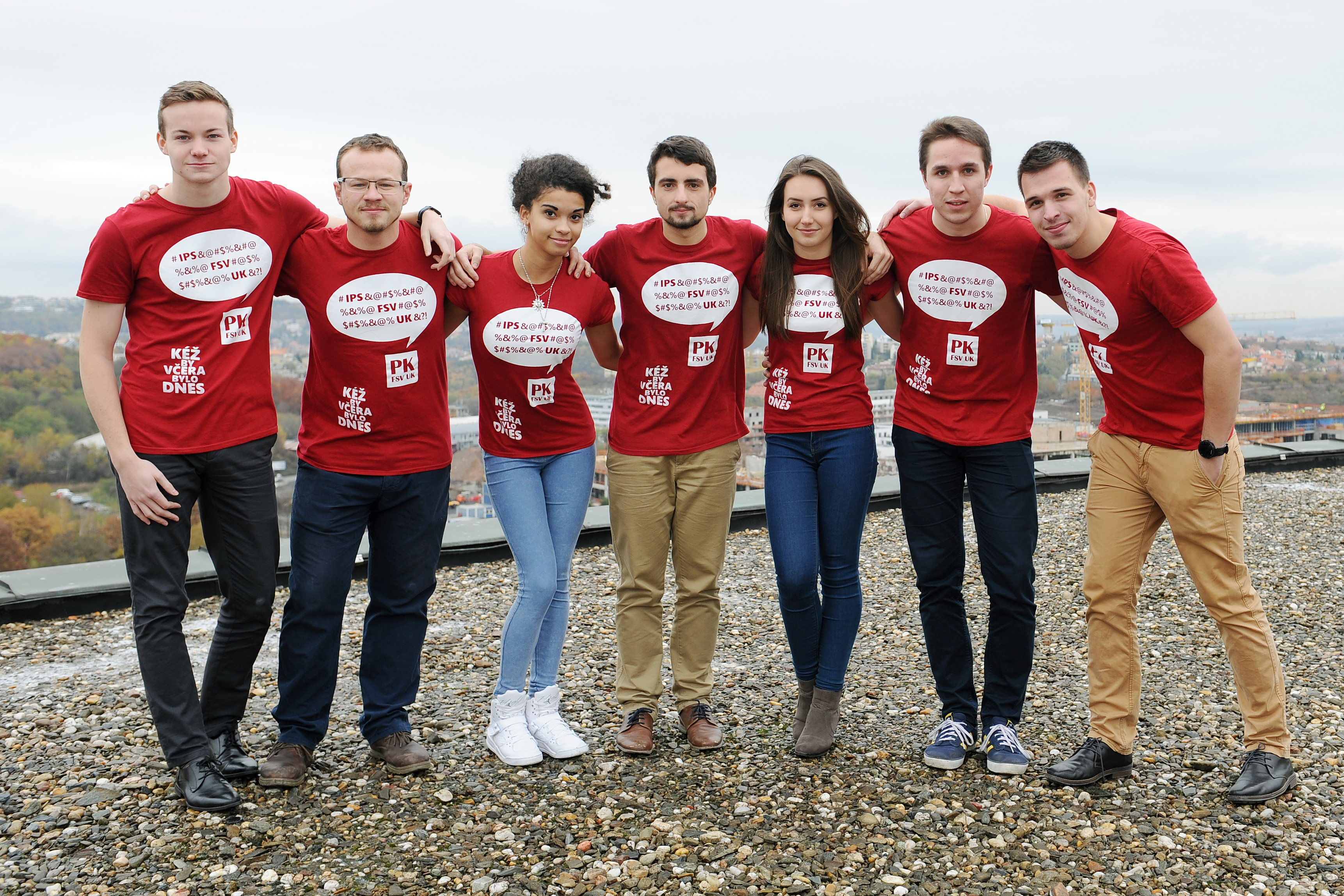 Fotografie členů vedení Politologického klubu pro rok 2016/2017. Místo: Areál FSV Jinonice.